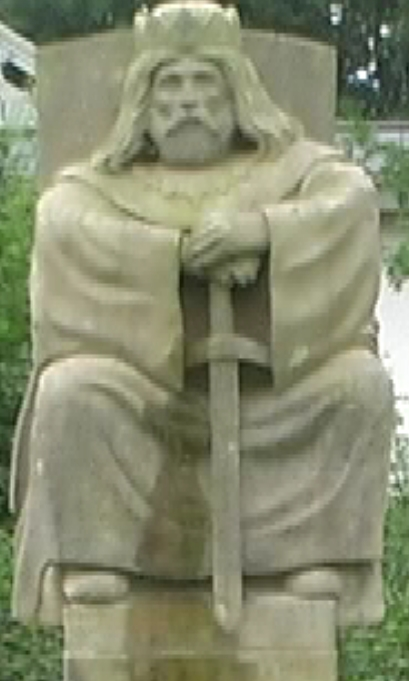 Serbski kral w lěkowanskim a powěsćowym parku, Borkowy (Błóta)